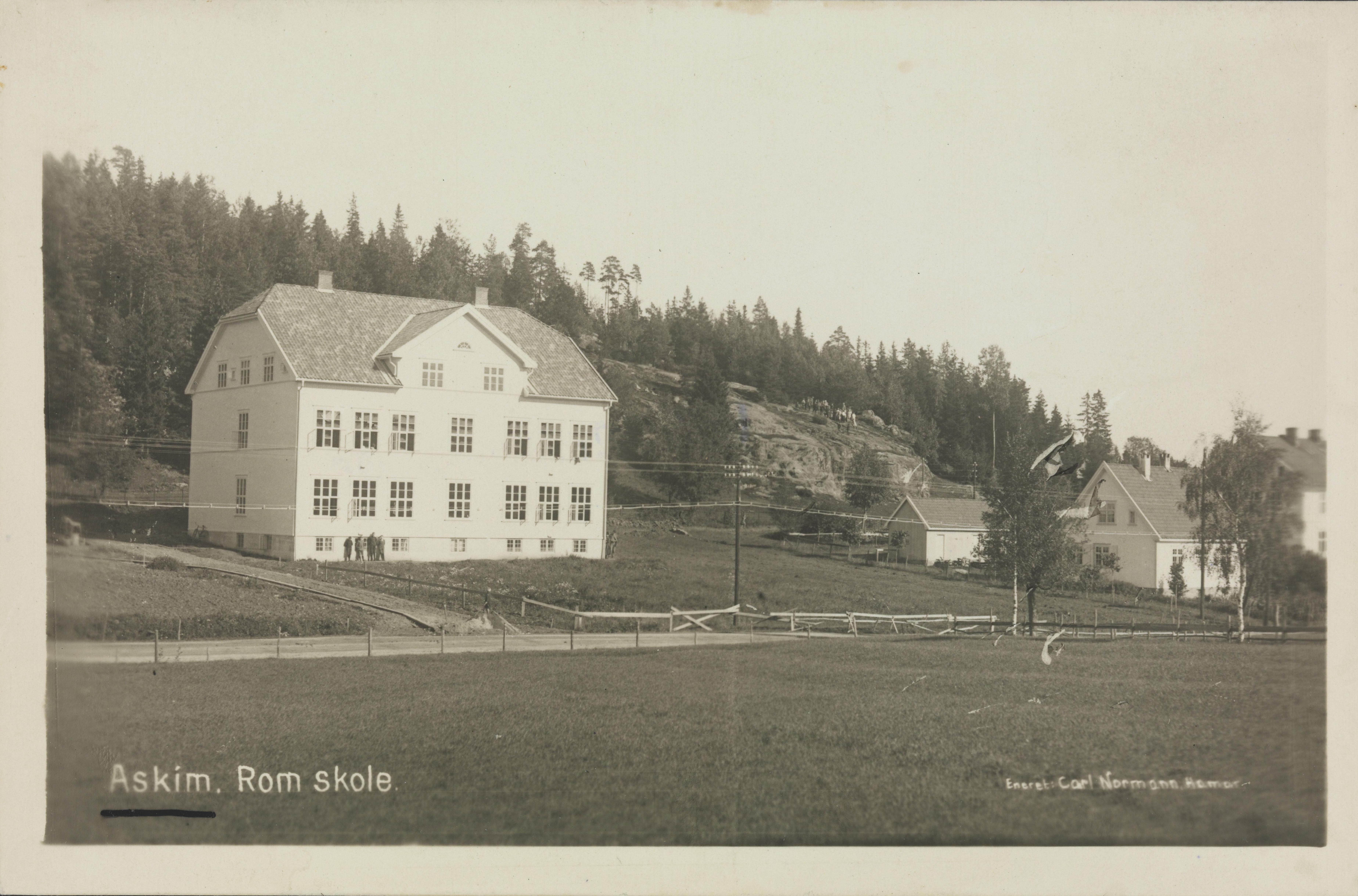 Bildet er hentet fra Nasjonalbibliotekets bildesamling